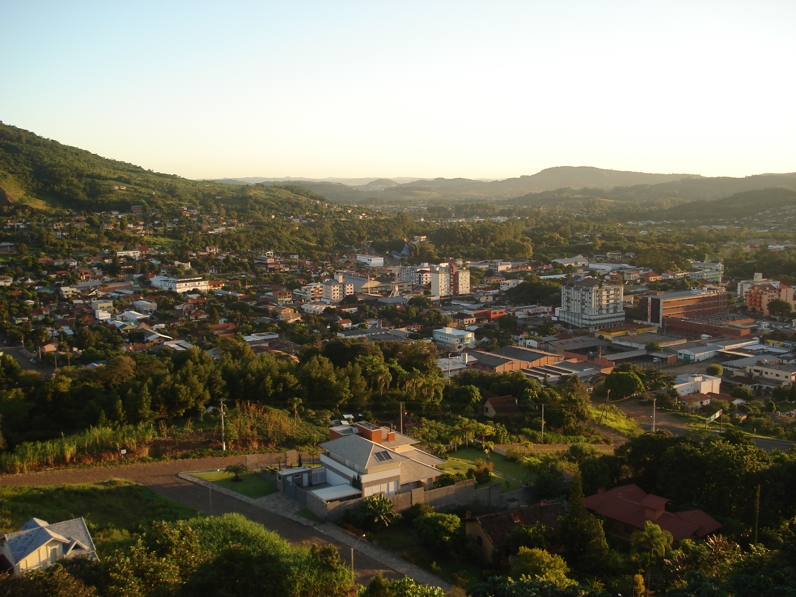 Vista da região central de Igrejinha